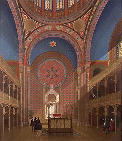 Der Innenraum der Synagoge in der Glockengasse Chromolithographie von J. Hoegg, nach einem Aquarell von Carl Emanuel Conrad, Düsseldorf, um 1861, 60,6 x 47,2 cm, Kölnisches Stadtmuseum - Graphische Sammlung, HM 1899/191